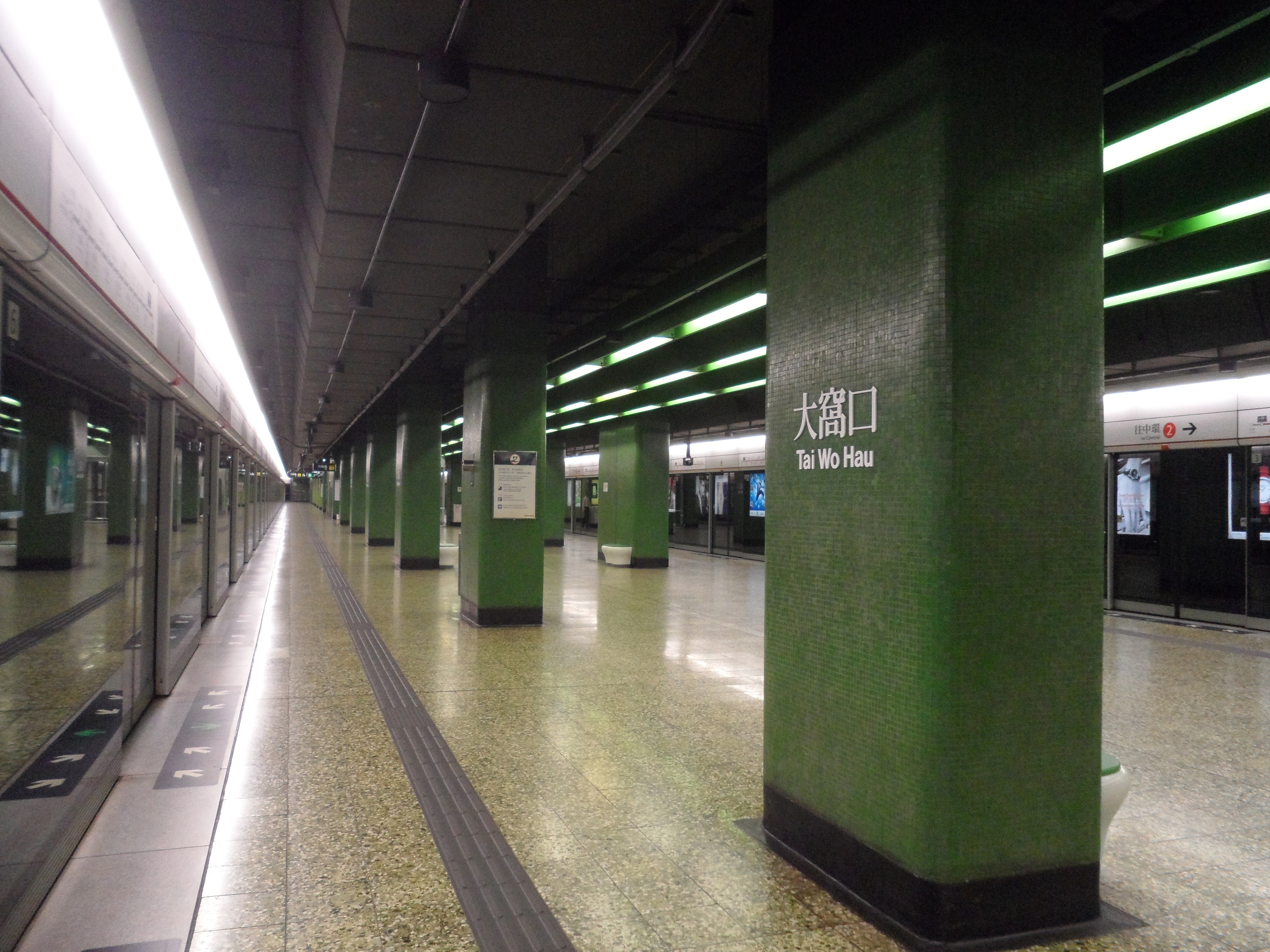 港鐵大窩口站月台